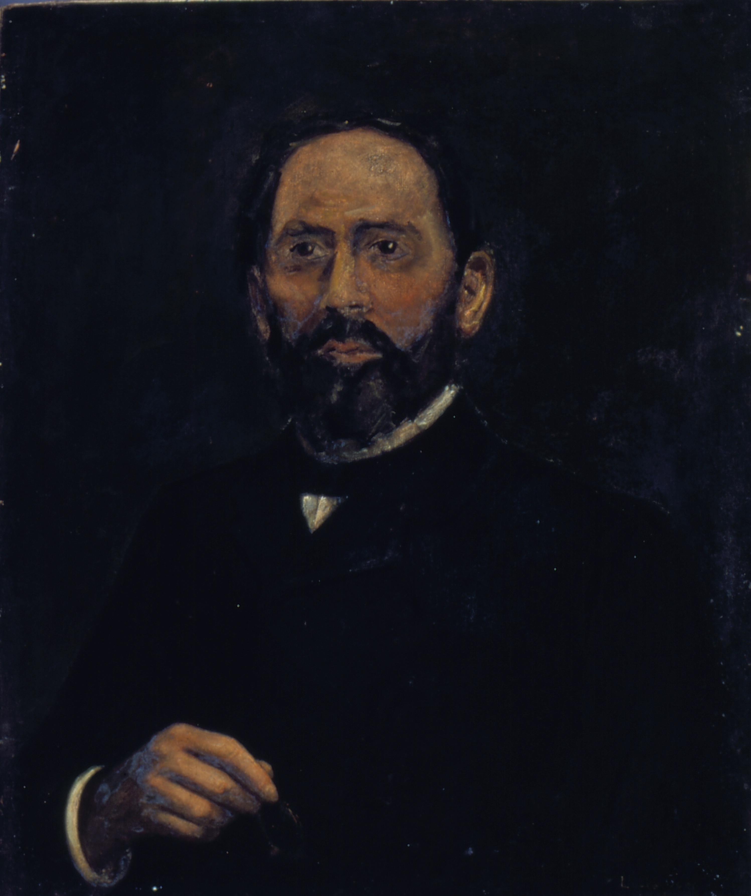 Obra que integra o acervo do Museu Paulista da USP.